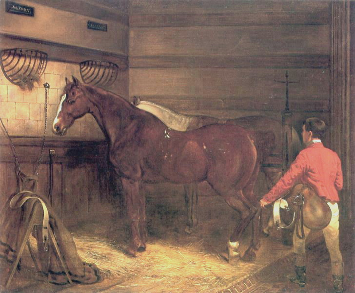 Der Fuchswallach Agathon, s. Bezeichnung über dem Futterkorb im 1827 von Schinkel errichteten Stallgebäude in Glienicke